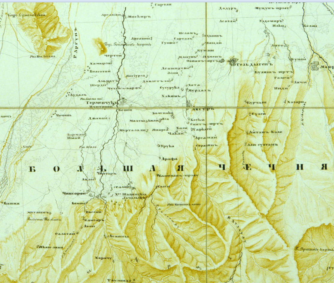 Салай и Салатай (карта XIX века)